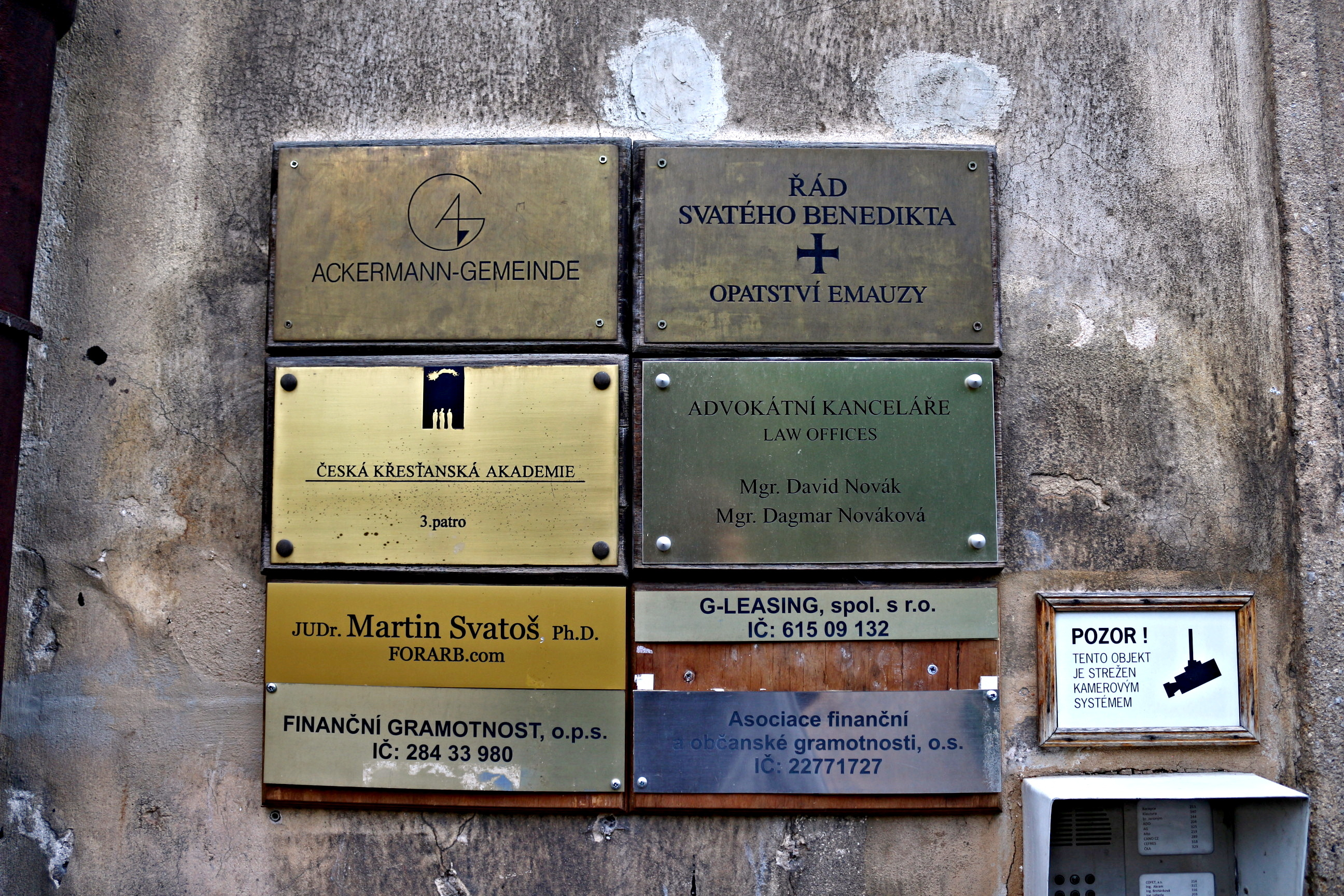 Klášter Na Slovanech - opatství